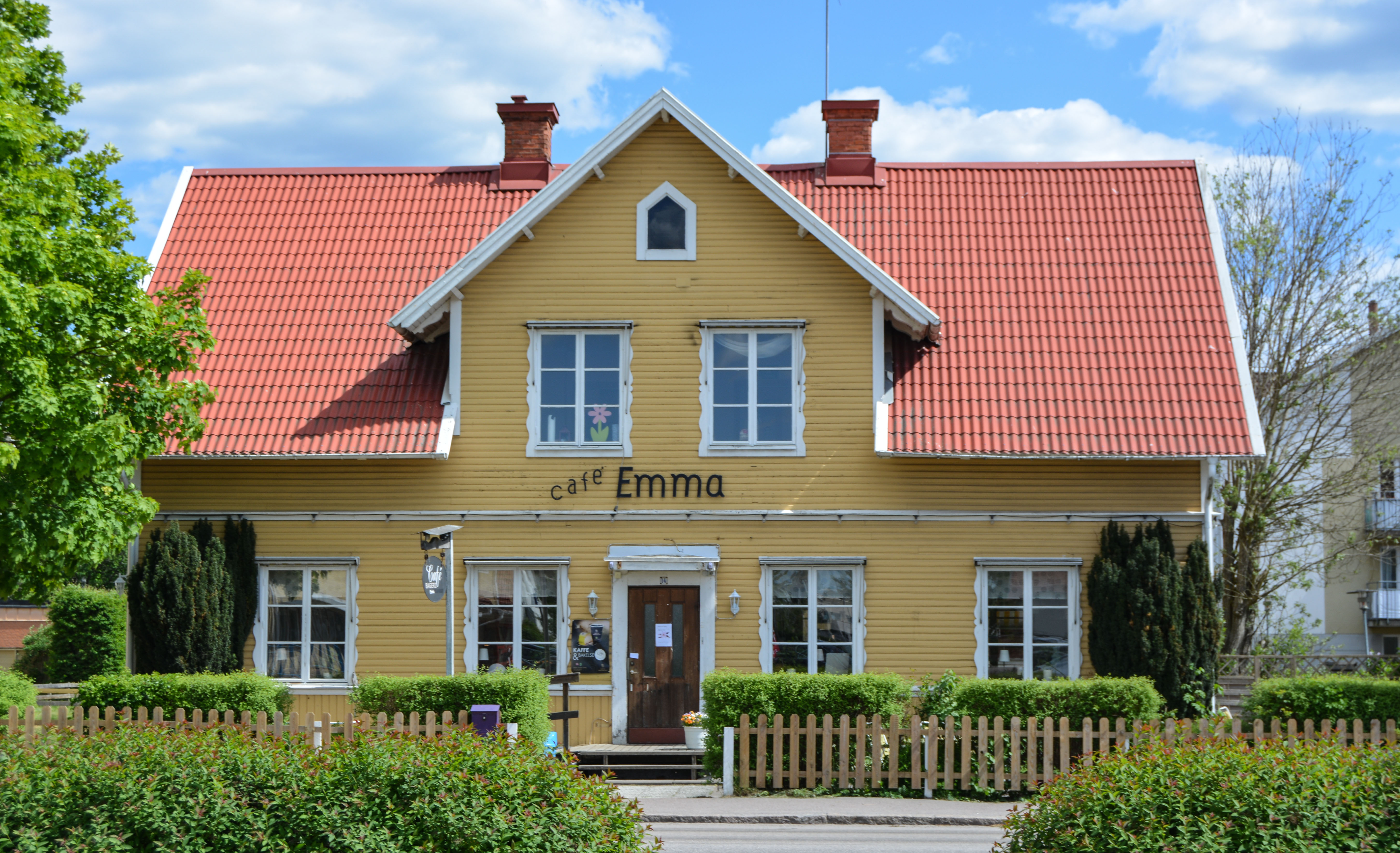 Emmaboda. Café Emma.I byggnaden utbröt under våren 2019 en brand vilket ledde till att byggnaden skadades så svårt att den numera är riven.